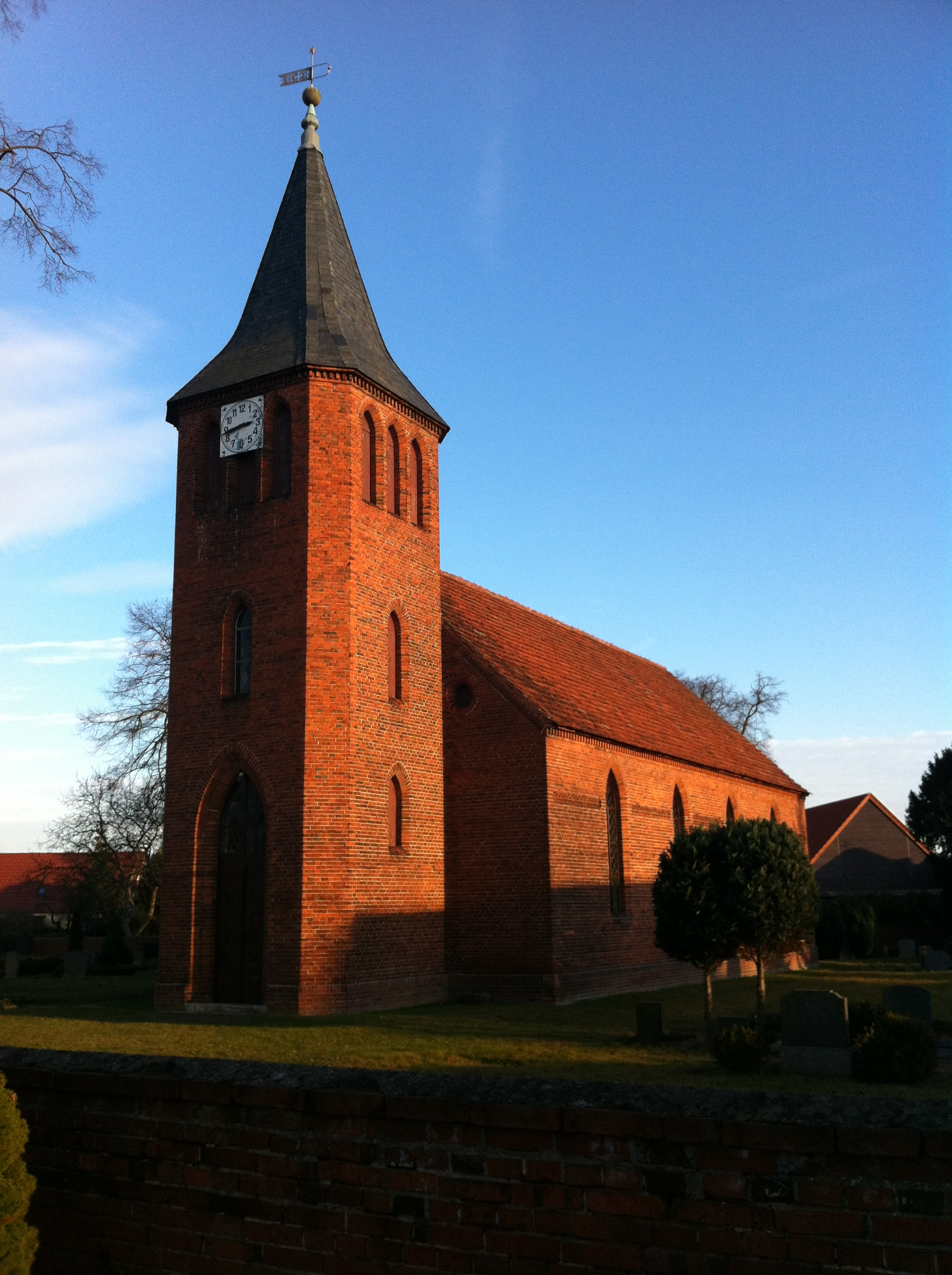 Dorfkirche in Böhne (Havelland), Ansicht von der Straße